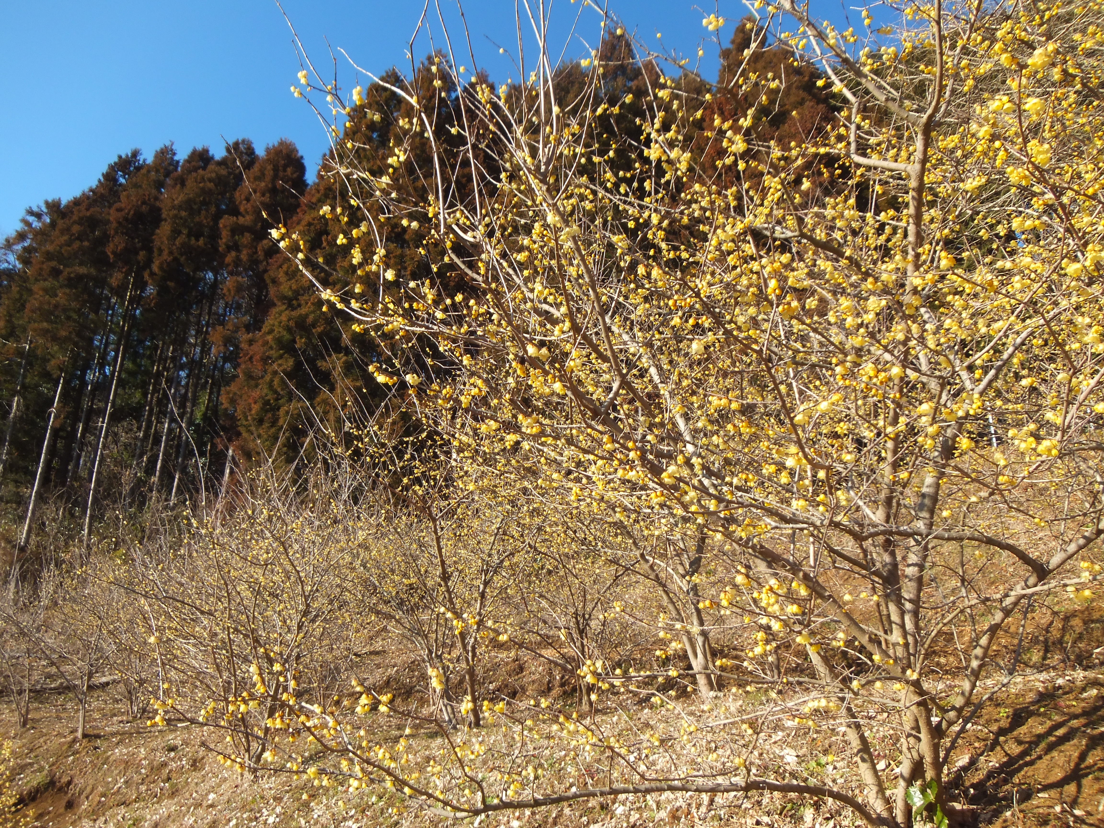 松田町寄(やどりき)ロウバイ園